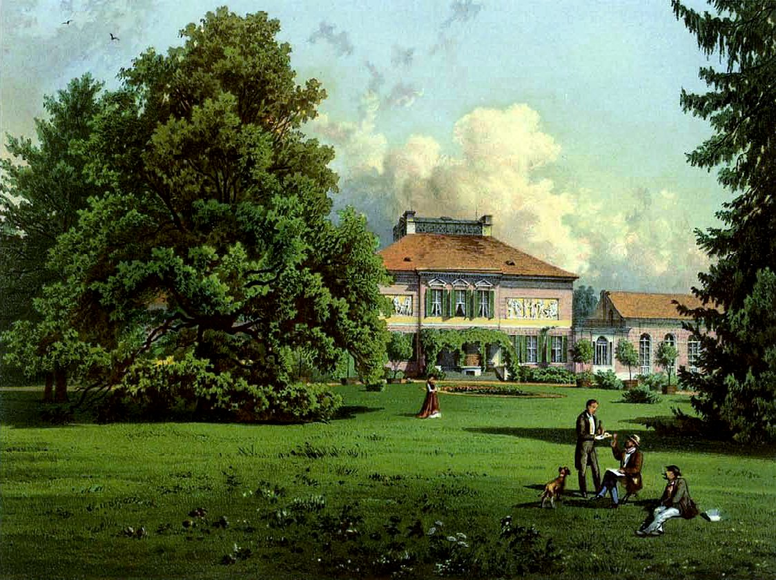 Rittergut Rosenthal, Kreis Schweidnitz